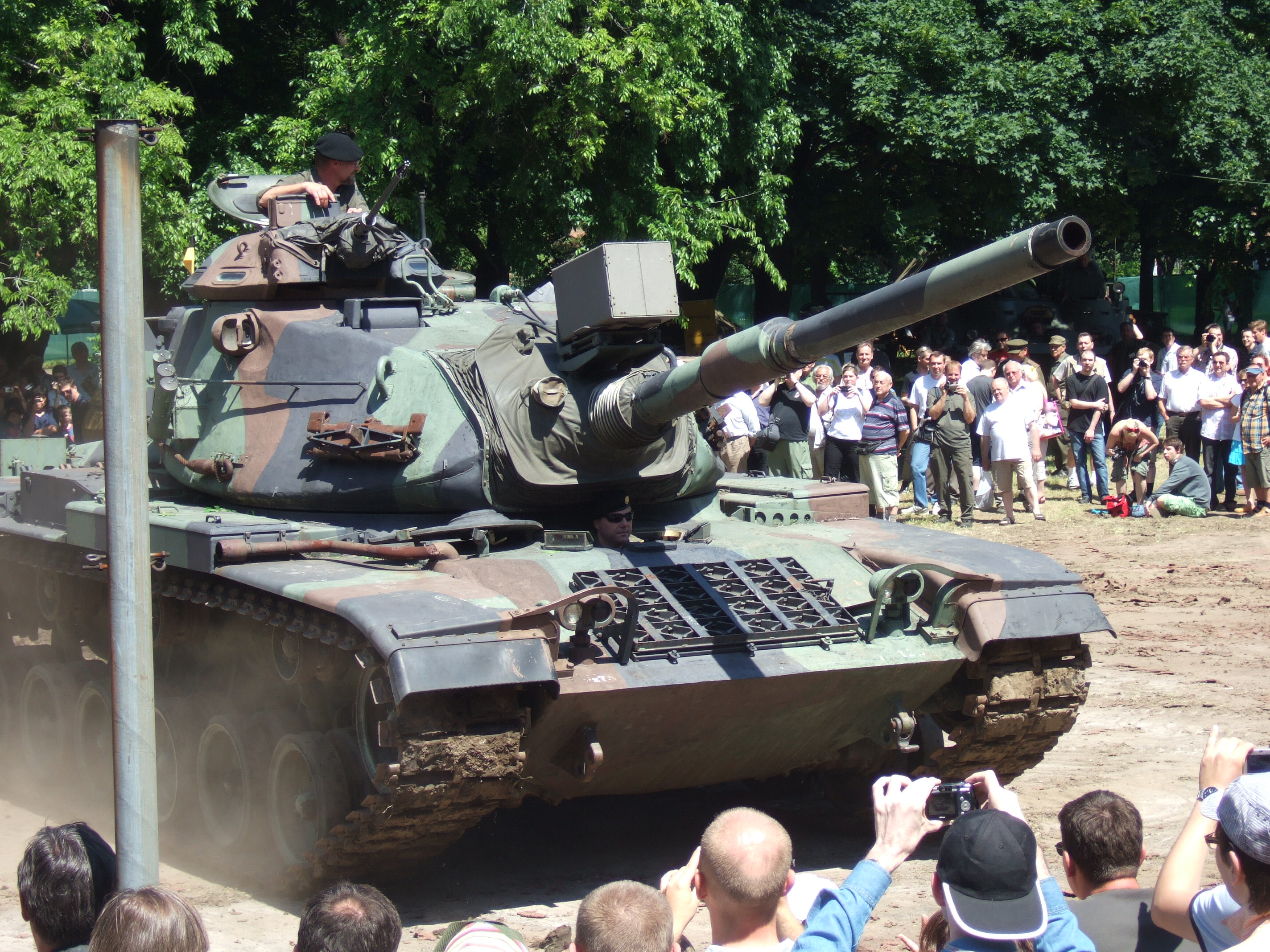 Fahrbereiter Kampfpanzer M-60 des Heeresgeschichtlichen Museums (HGM) bei einer Vorführung der Veranstaltung "Auf Rädern und Ketten" im HGM.